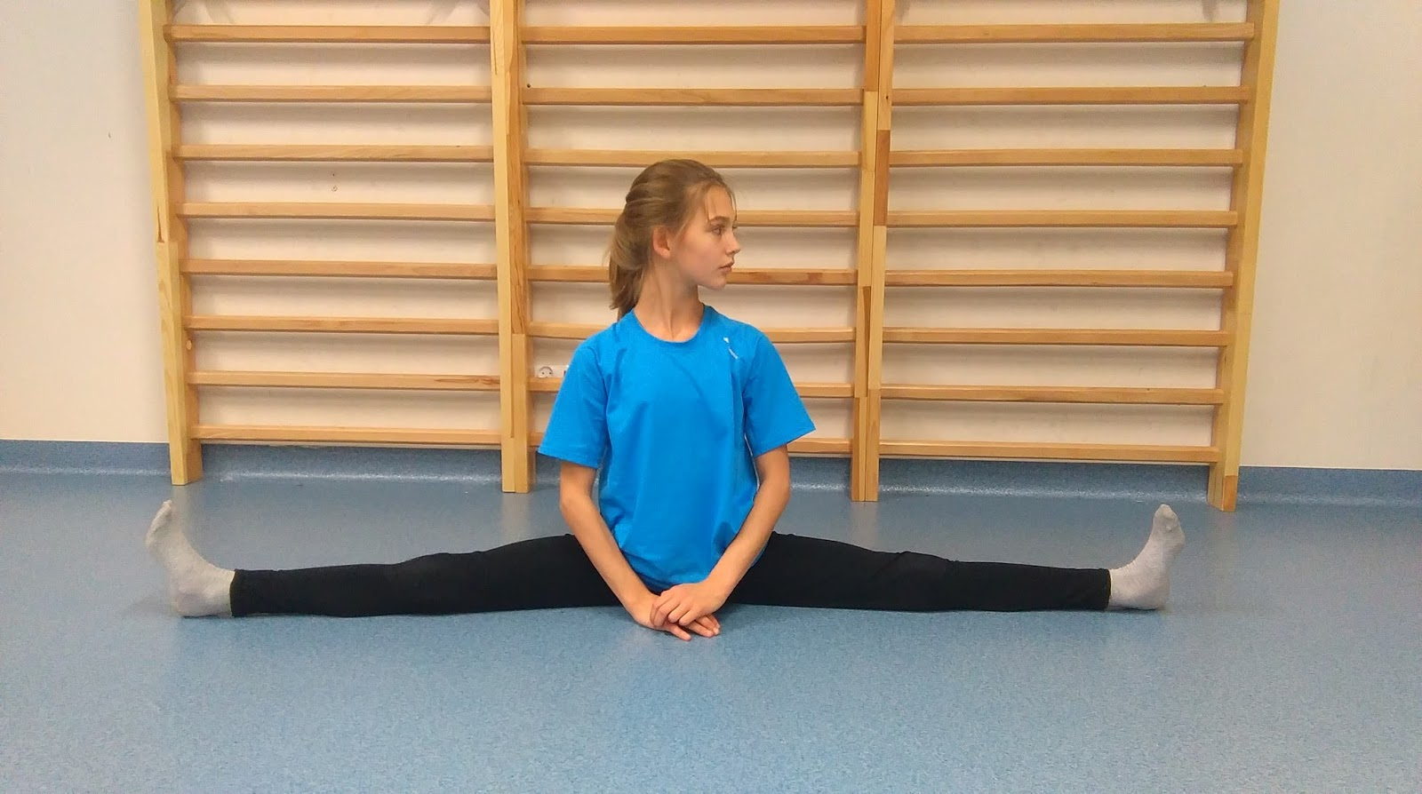 szpagat poprzeczny